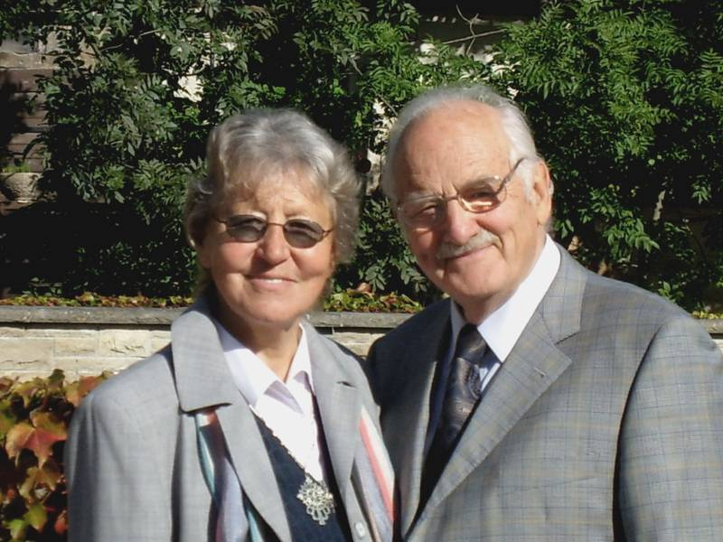 Dr Dieter und Lydia Schmoll